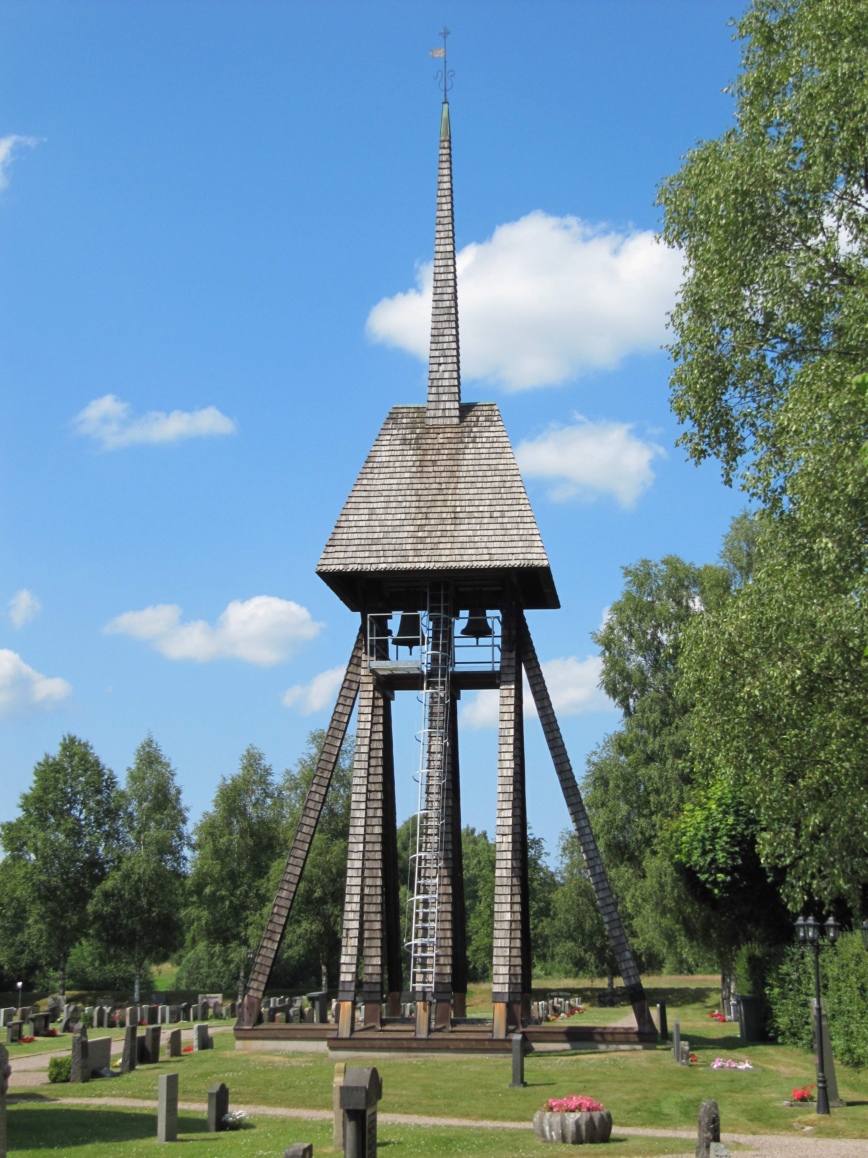 Klockstapel vid Kånna kyrka